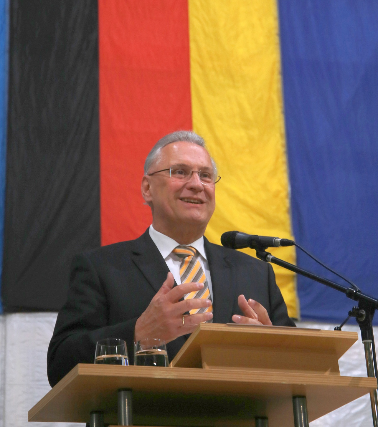 Joachim Herrmann, deutscher Politiker (CSU), seit Oktober 2007 Bayerischer Staatsminister des Innern. Hier während des Richtsfest eines Behördengebäudes in München. Titel des Werks: "Joachim Herrmann 2017 in München"